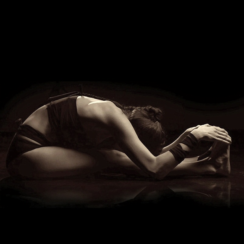 Paschimotanasana by Nina Mel, Yoga Teacher